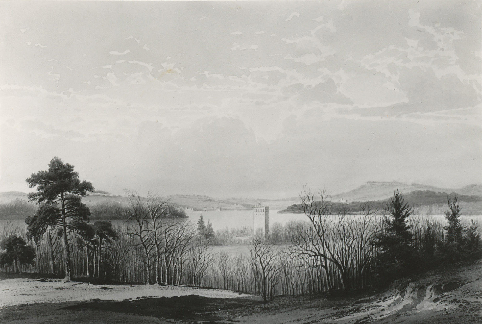 Julius Hennicke, Blick vom Böttcherberg zum Hofgärtner- und Maschinenhaus